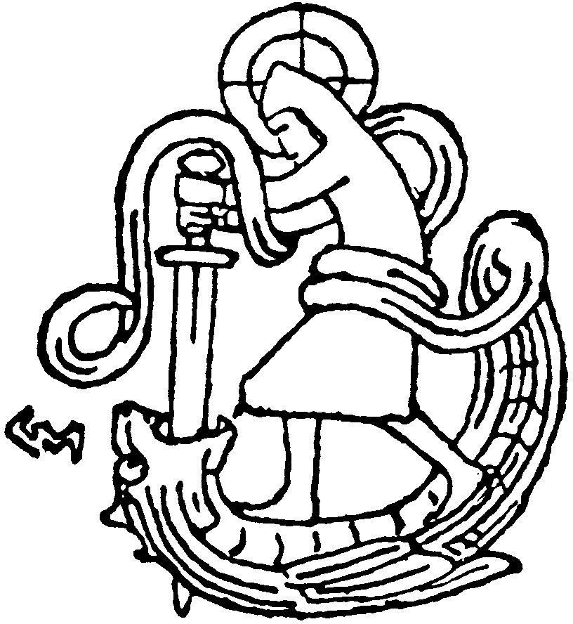 Gerhard Munthe: Illustration for Olav den helliges saga, Heimskringla 1899-edition. Sluttvignett.